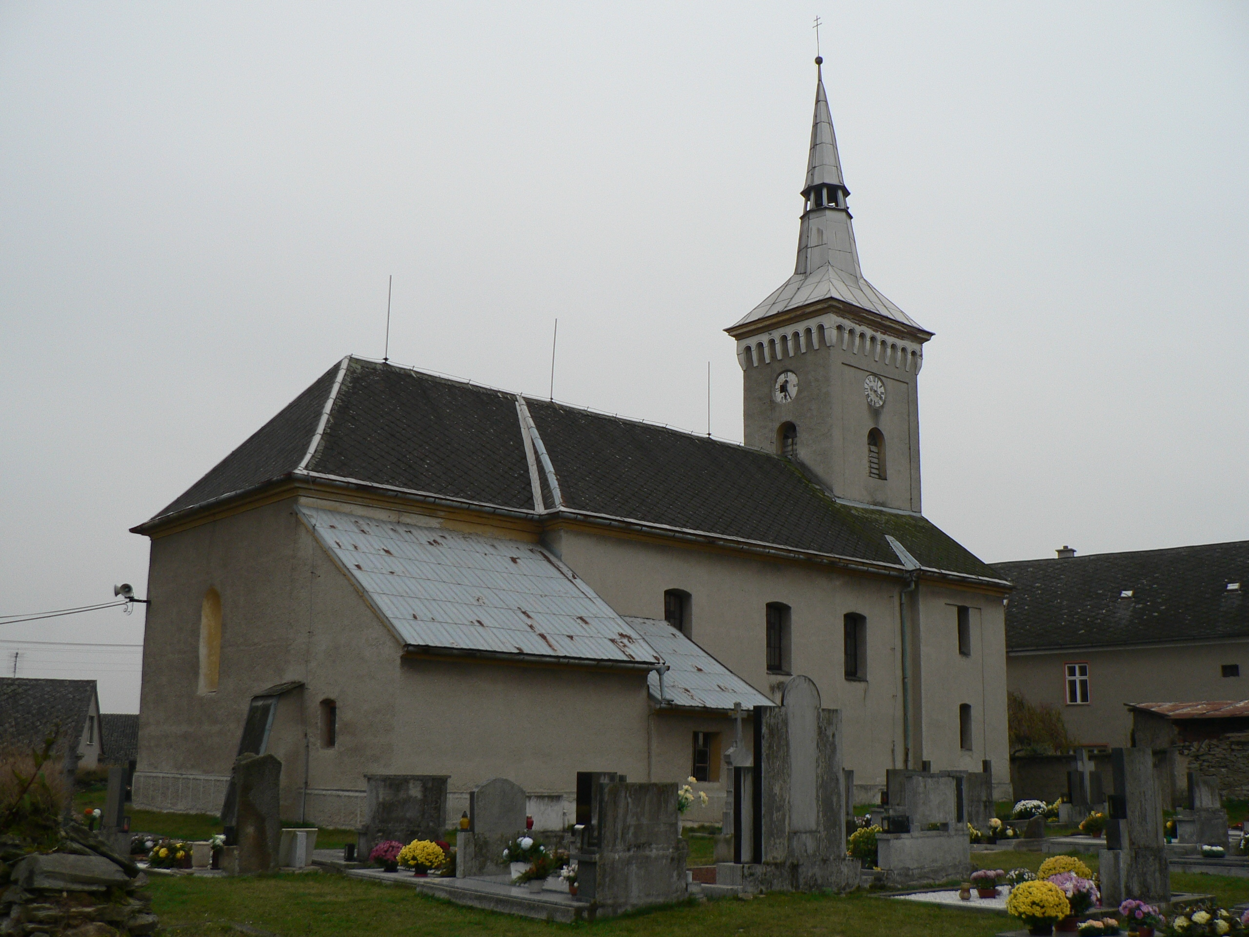 Kostel svatého Mikuláše (Police)